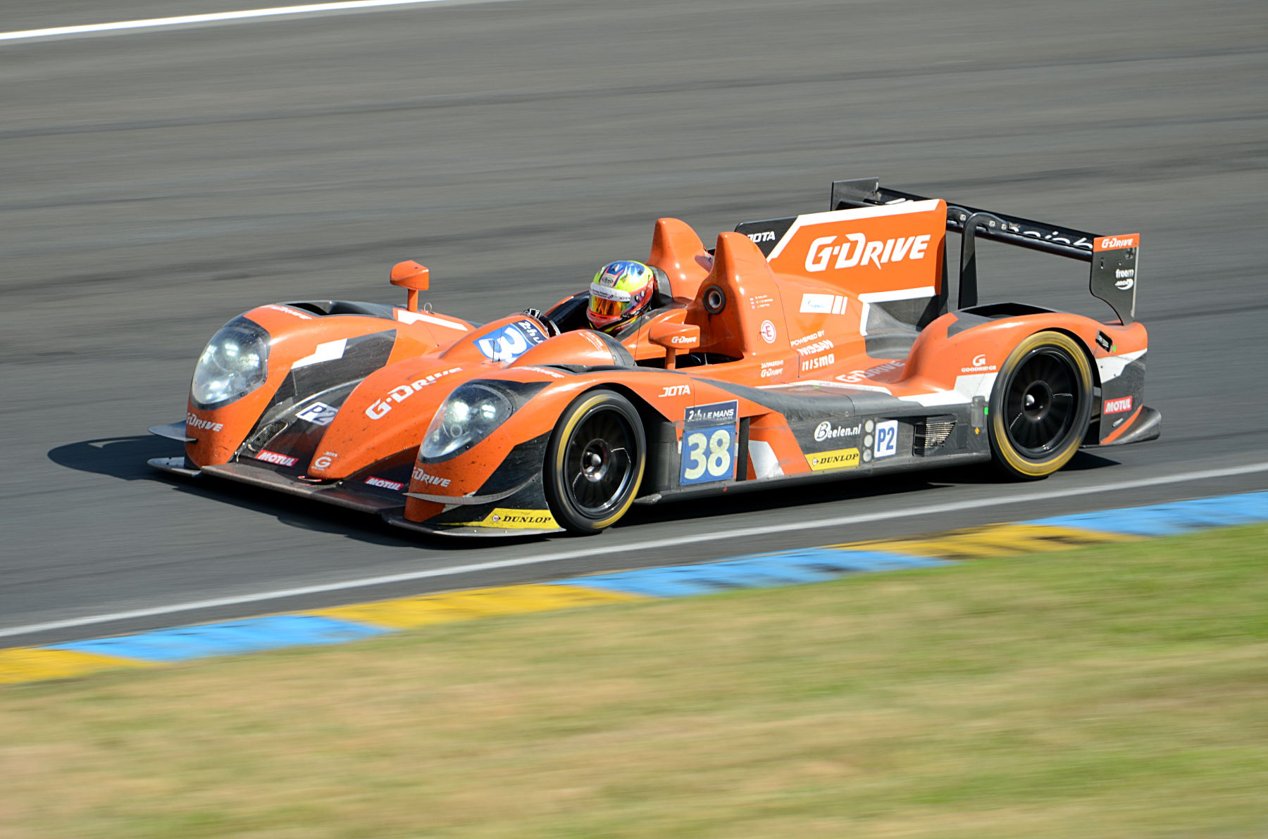 La Gibson 015S - Nissan de l'écurie G-Drive Racing pilotée par Simon Dolan, Giedo Van der Garde et Jake Dennis lors des 24 Heures du Mans 2016